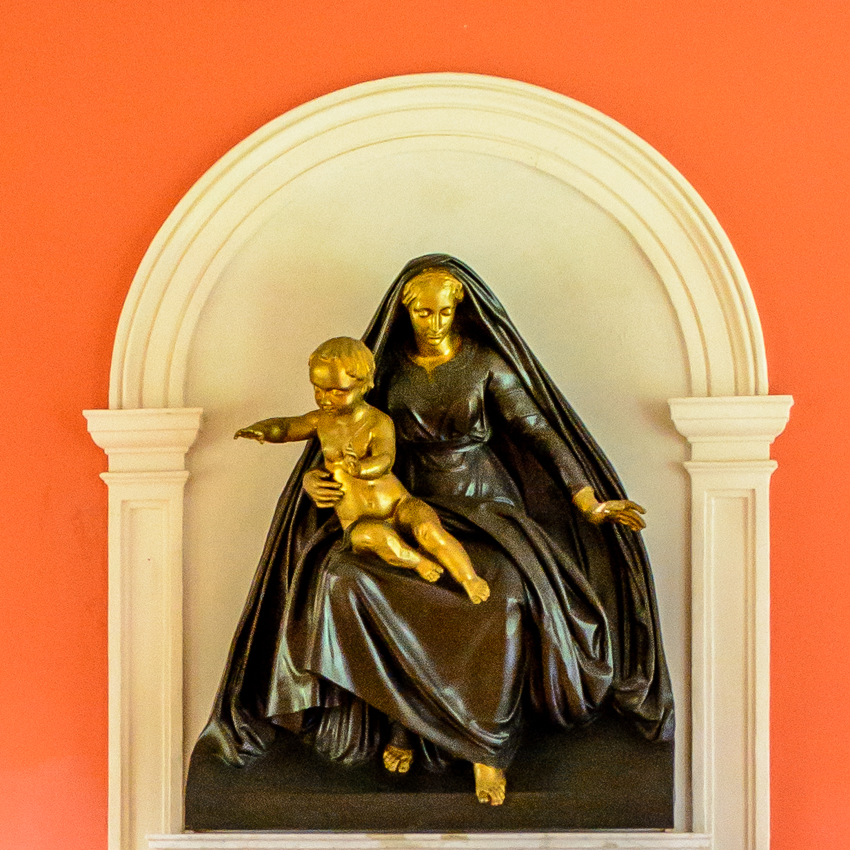 Skulptuur "Madonna lapsega", 19.saj. (kips, vaskplekk)